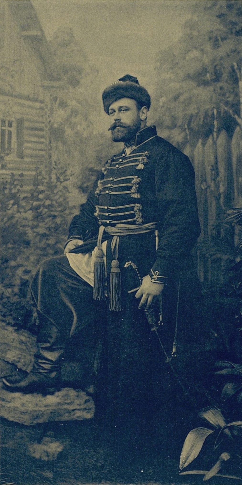 Герцог Николай Николаевич Лейхтенбергский в костюме Русского стрелецкого – начальника XVII века.